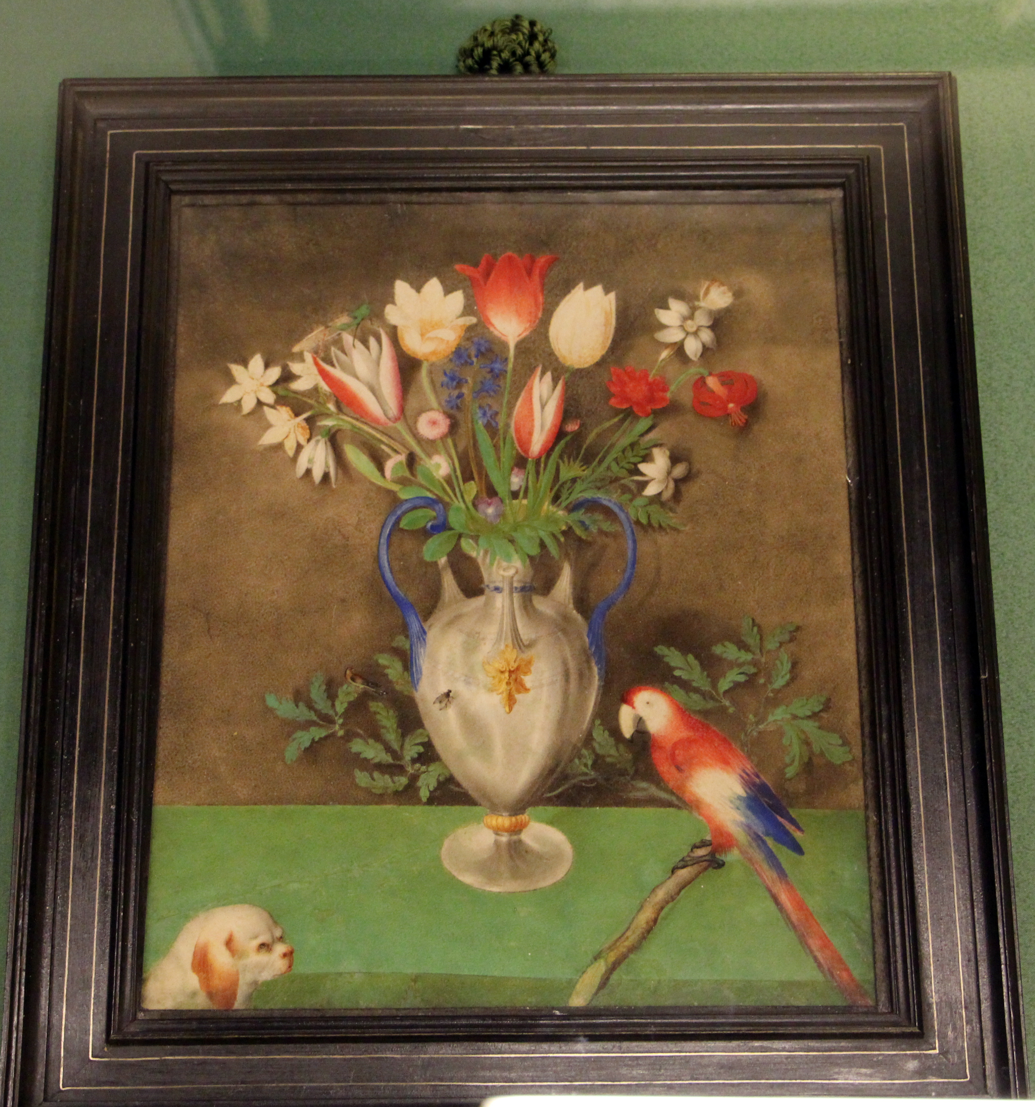 Villa medicea di Poggio a Caiano - MIBAC The making of this document was supported by Wikimedia CH. (Submit your project!) For all the files concerned, please see the category Supported by Wikimedia CH. This is a photo of a monument which is part of cultural heritage of Italy.